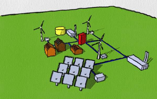 Darstellung des Konzepts eines virtuellen Kraftwerks